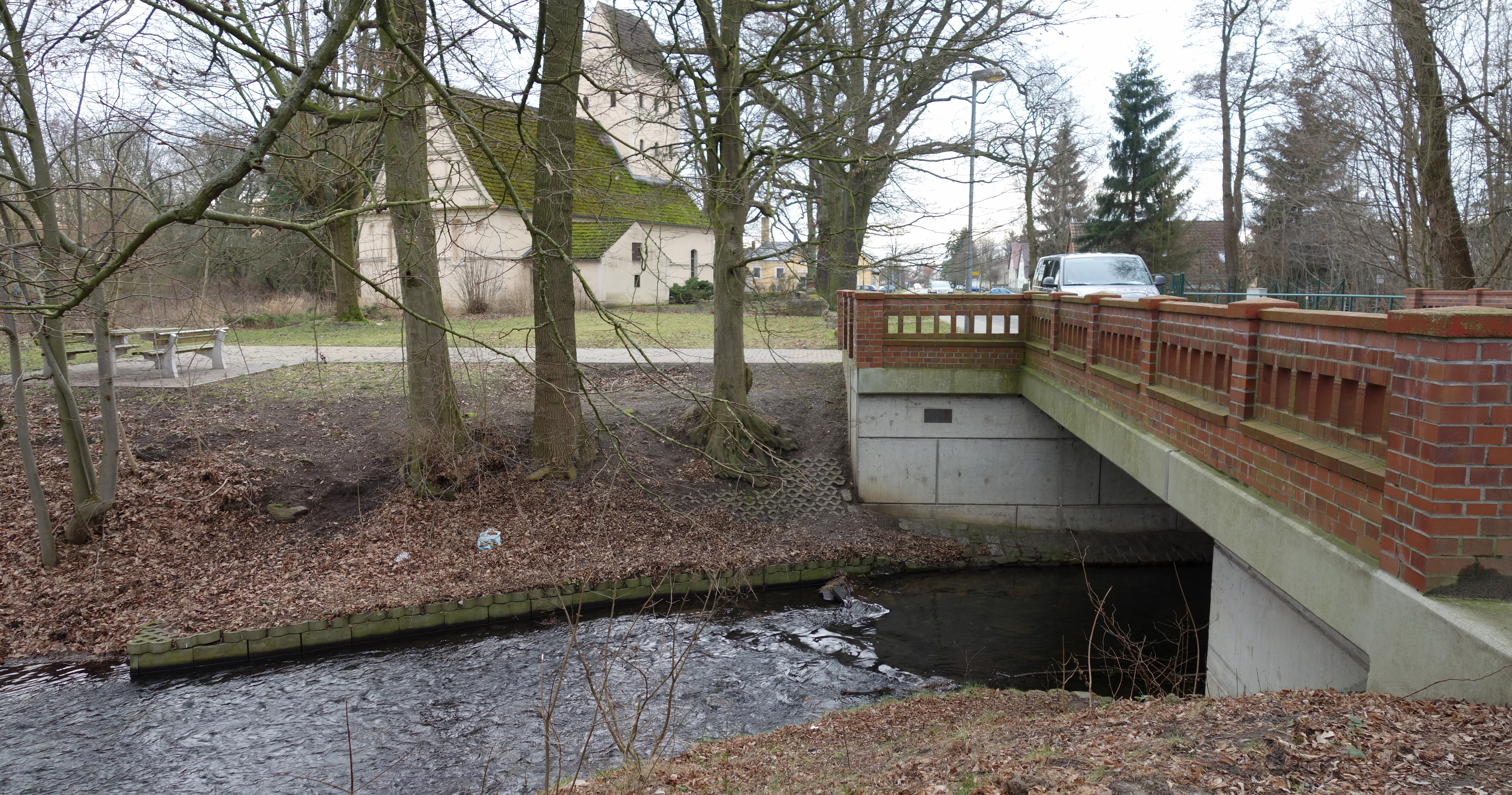 Die Temnitzbrücke der Kreisstraße 6807 in Walsleben. Im Hintergrund die Dorfkirche